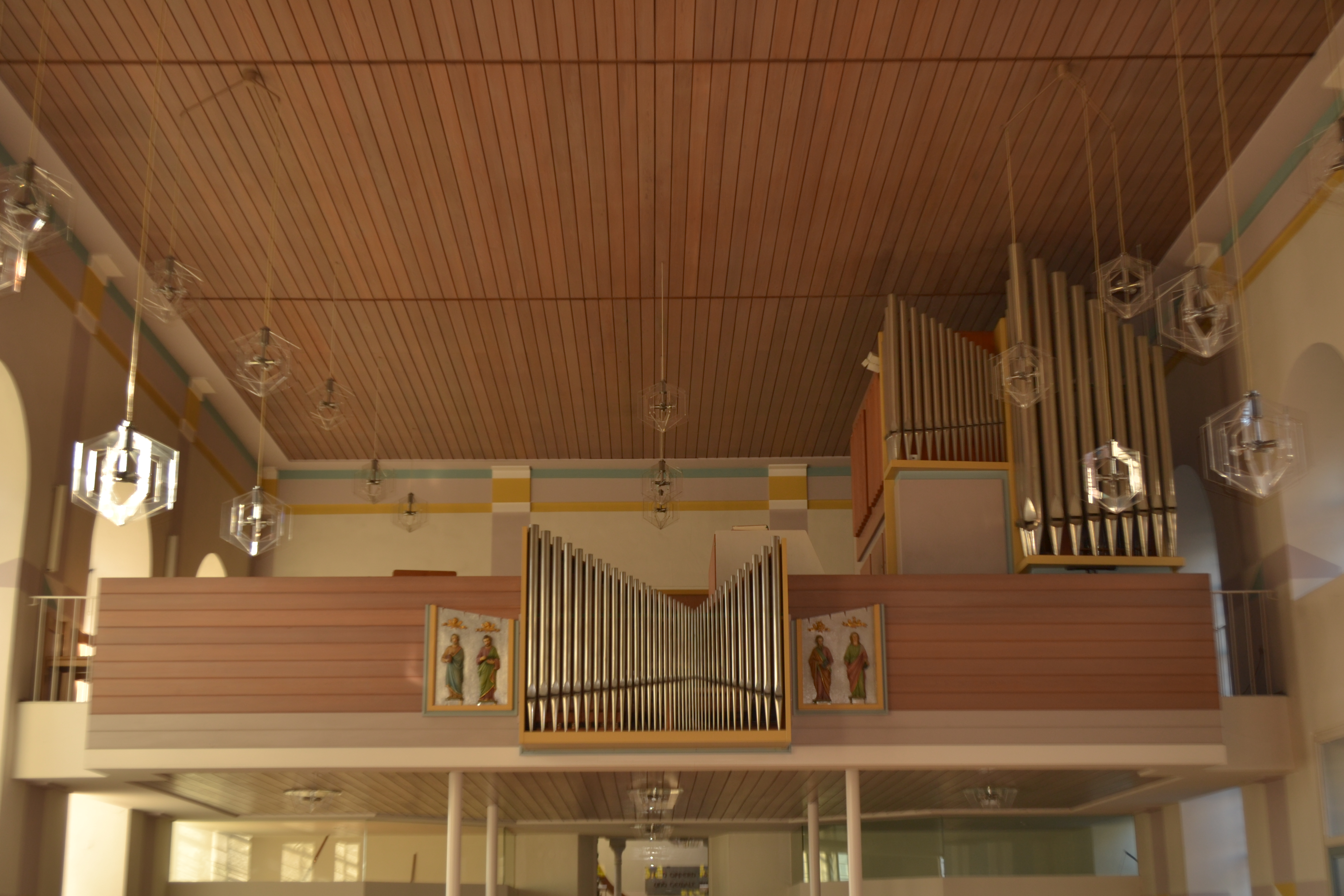 Die Orgel vom Altar aus gesehen